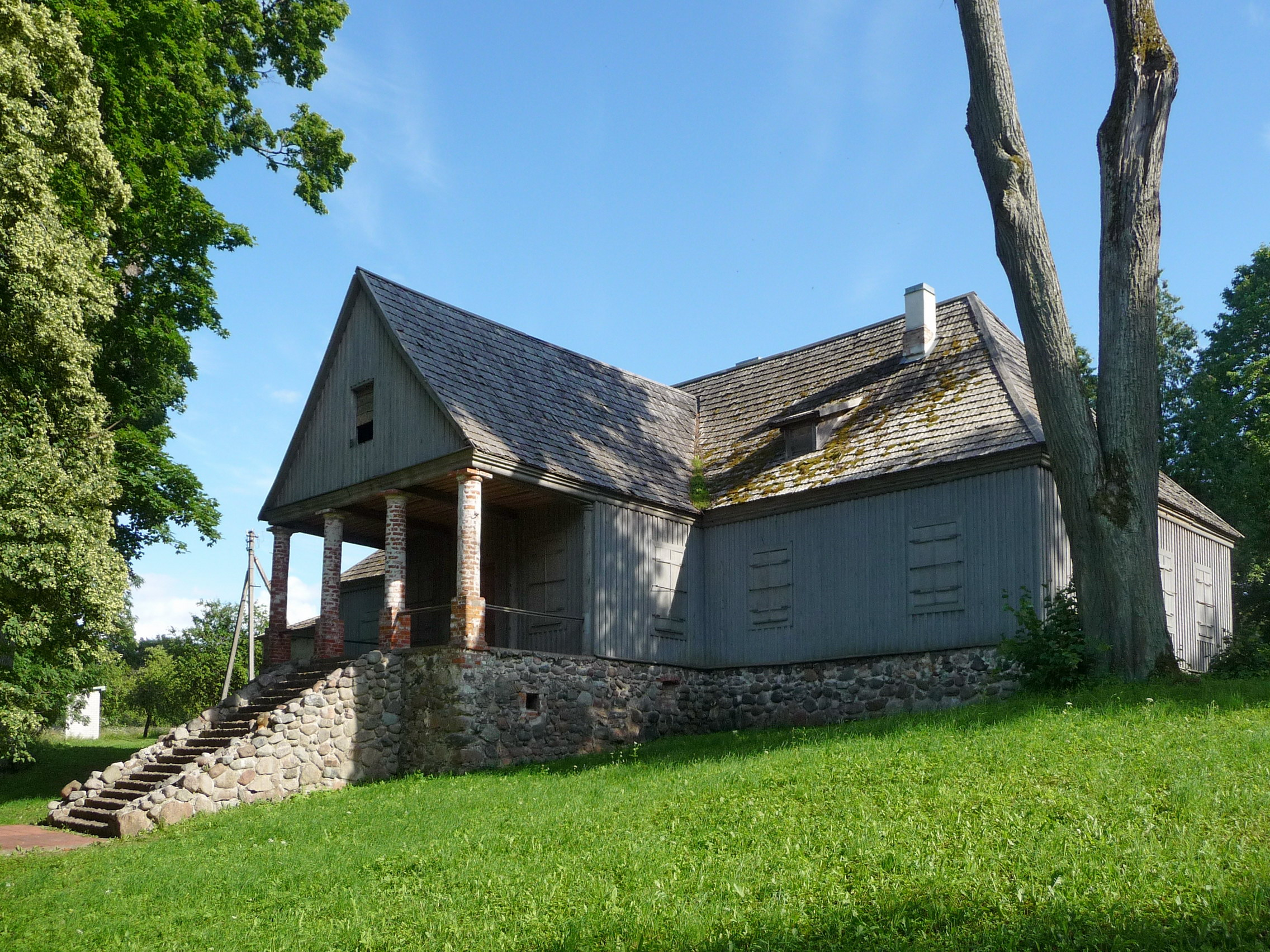 Ilguvos dvaro rūmai